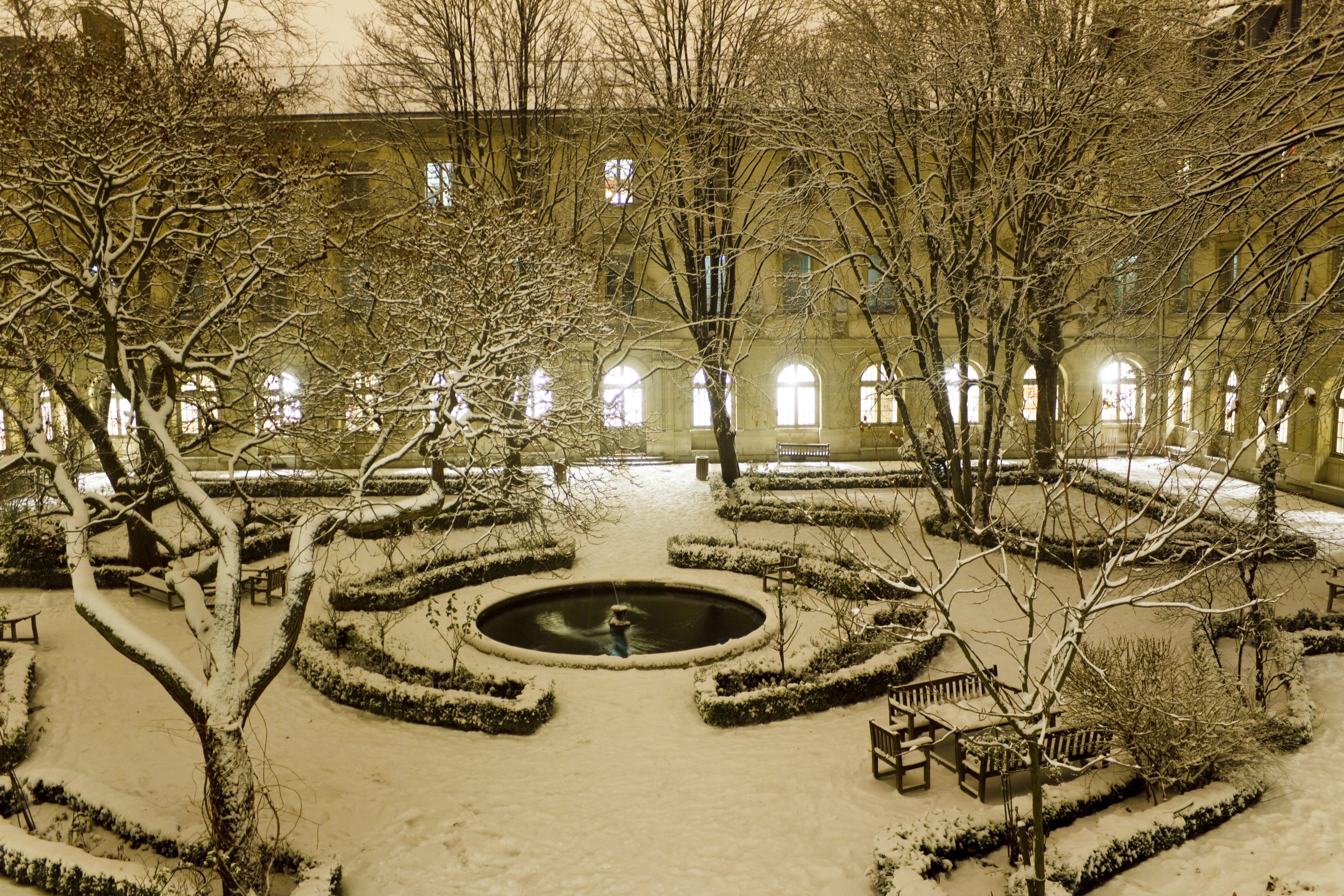 Cour intérieure de l'Ecole Normale Supérieure (Paris), et bassin aux Ernests, de nuit, sous la neige.